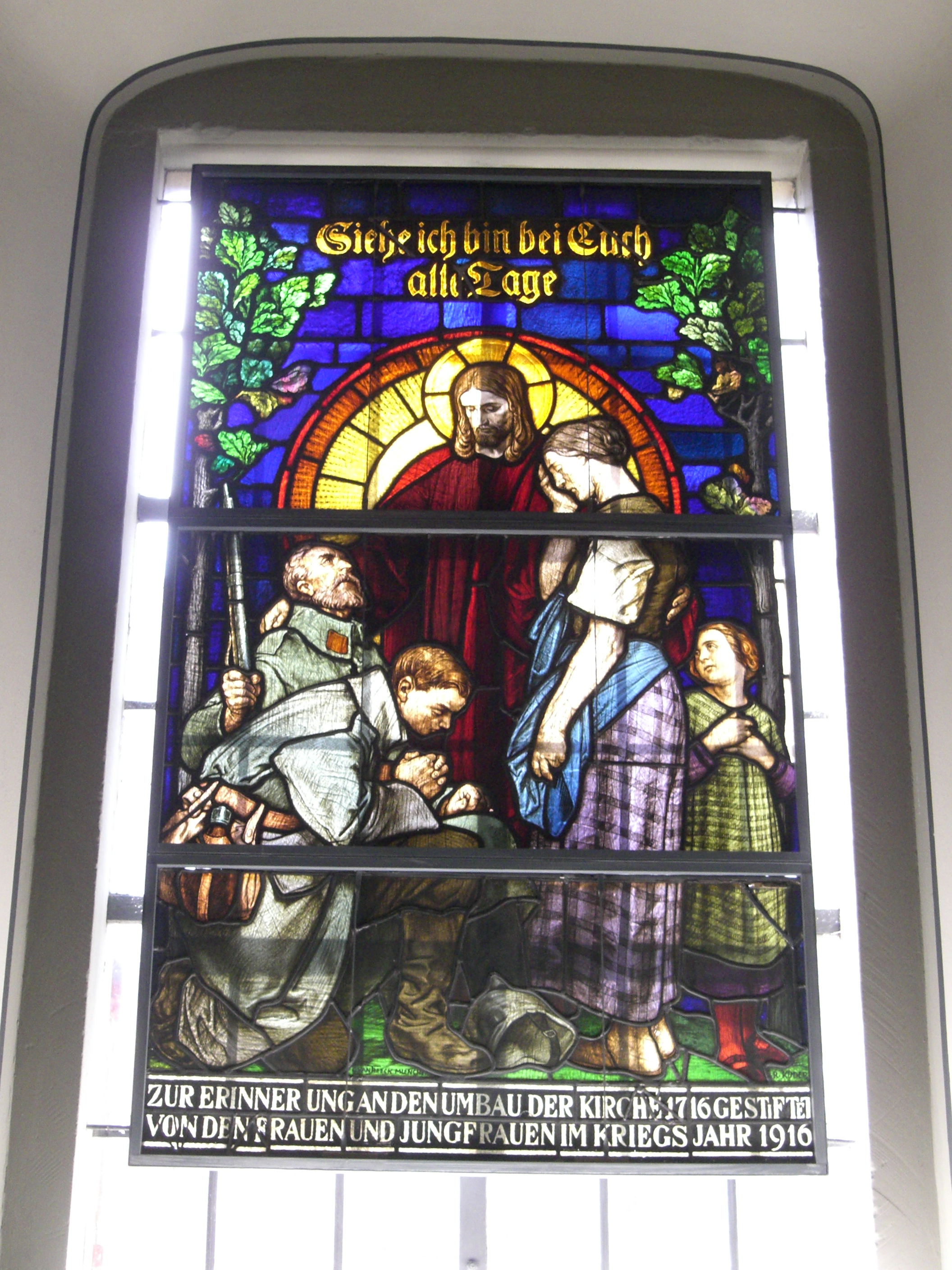 Bleiglasfenster in der Dorfkirche in Niederwerrn